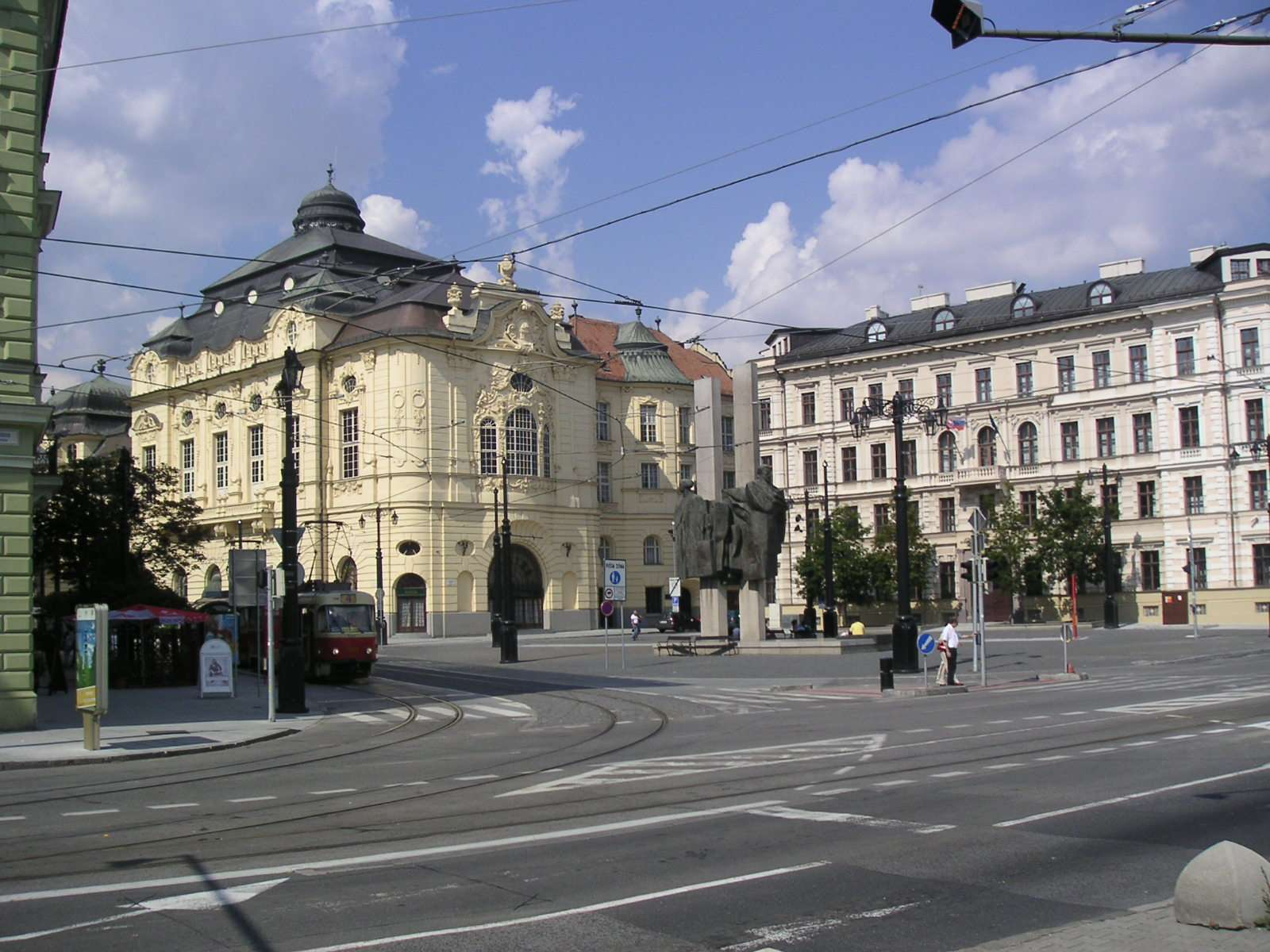 Bratislava - Sturplatz (ehemaliger Krönungshügelplatz), im Hintergrund die Pressburger Philharmonie